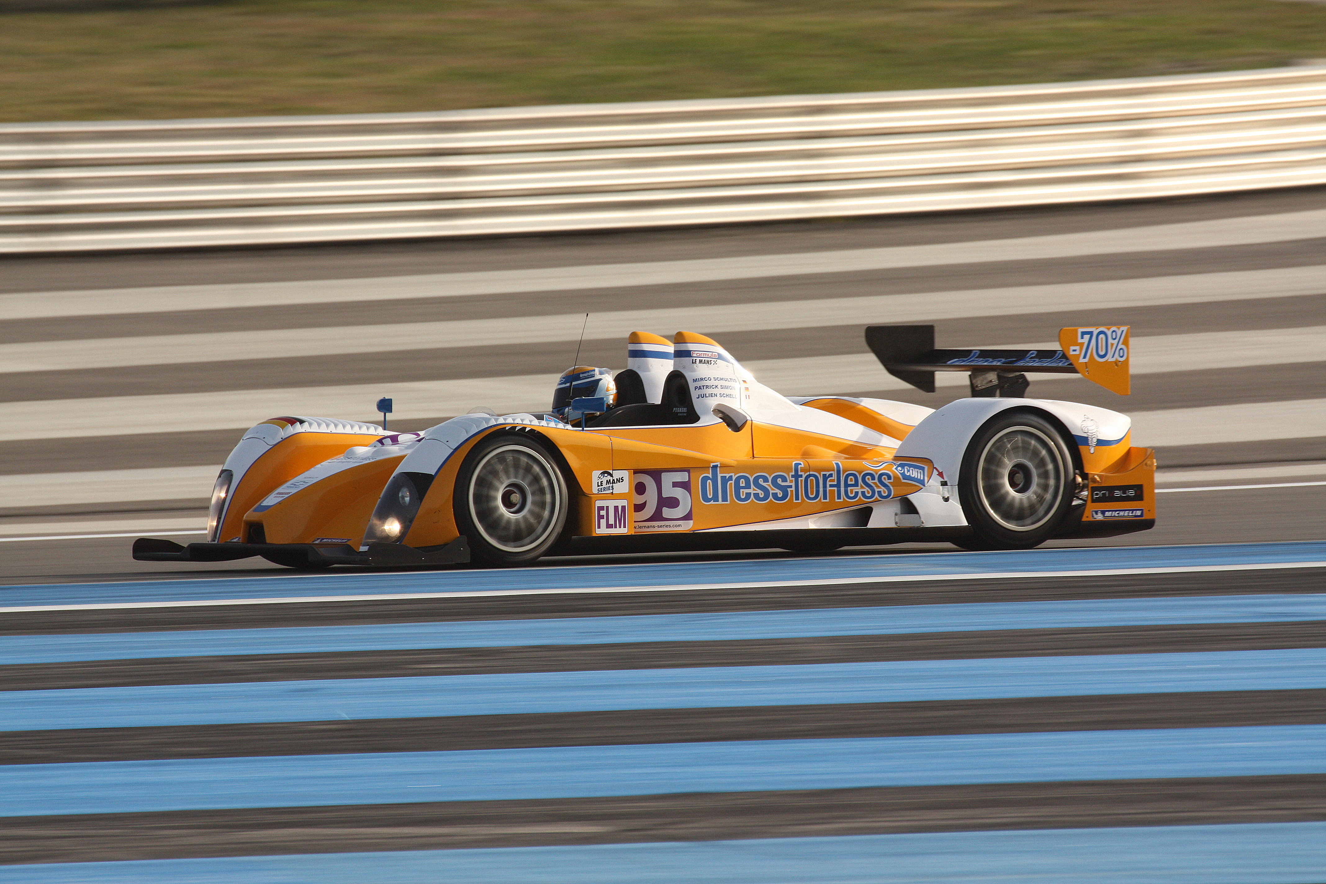 prototype Formula Le Mans pilotés par Mirco Schultis (All), Patrick Simon (All) , Julien Schell (Fra)